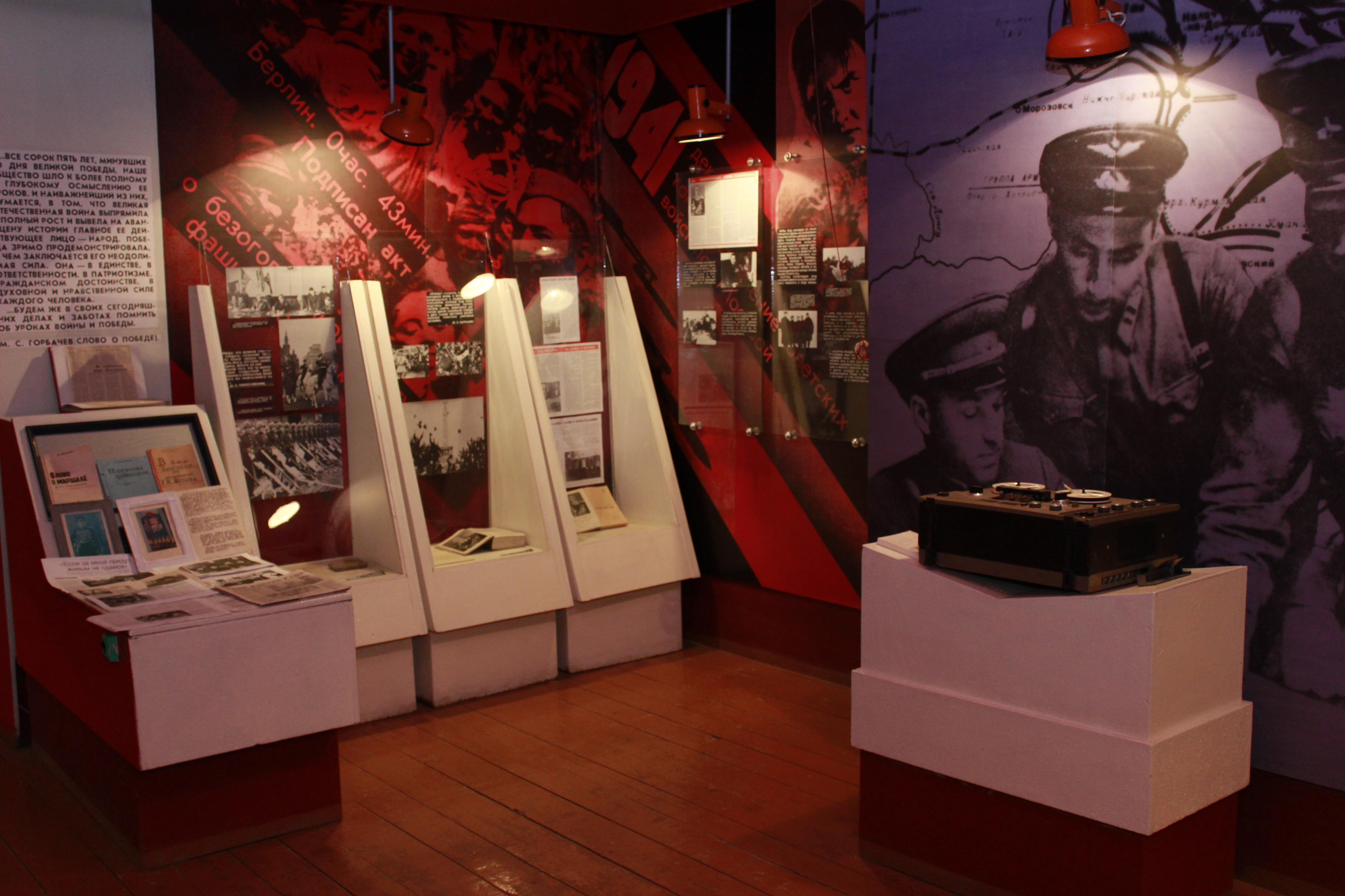 Музей маршала К.К. Рокоссовского в Желтуринской средней школе, Джидинский район, Бурятия